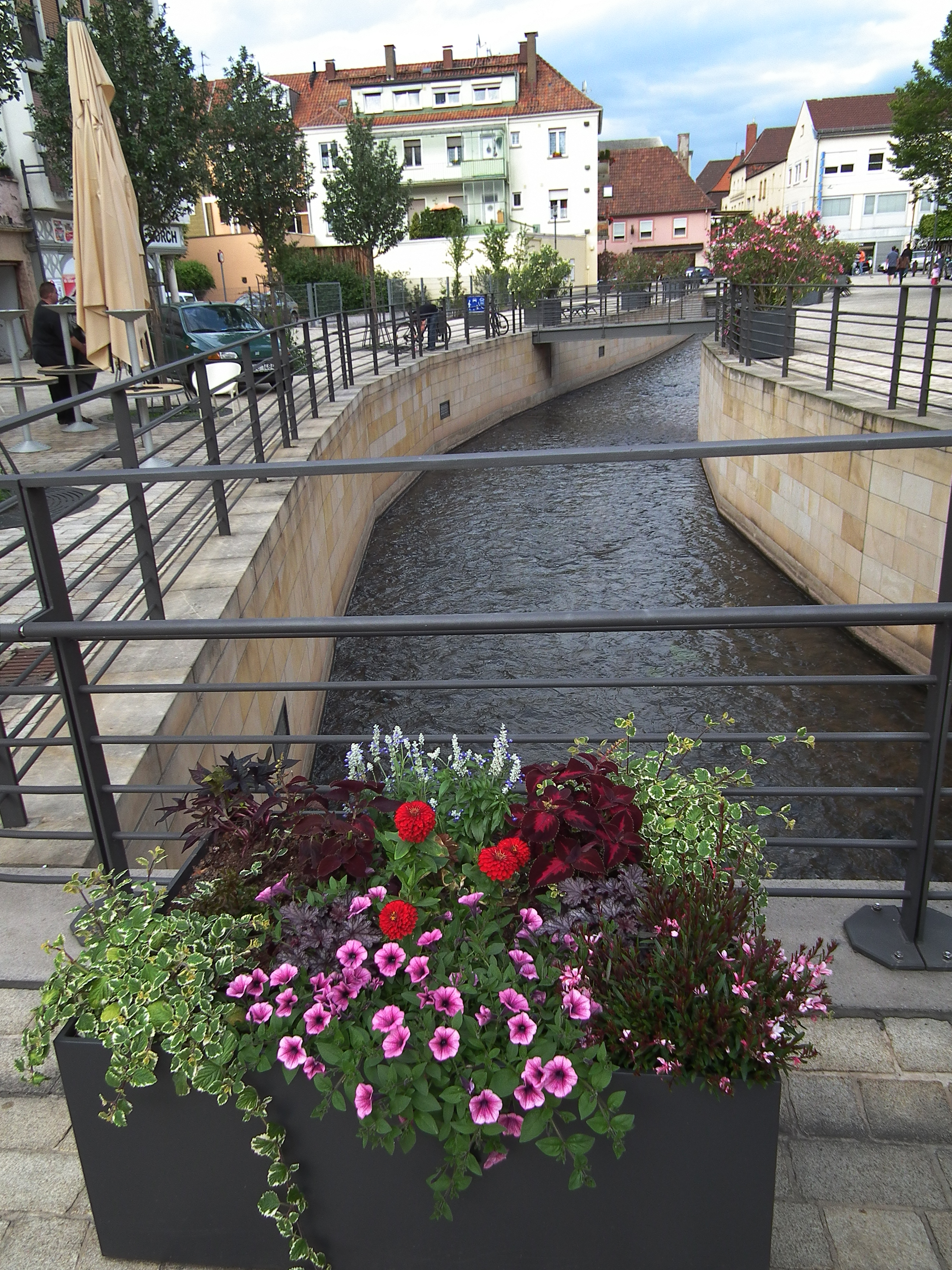 Queich (Flüsschen) in der Innenstadt von Landau (Rheinland-Pfalz, Deutschland)